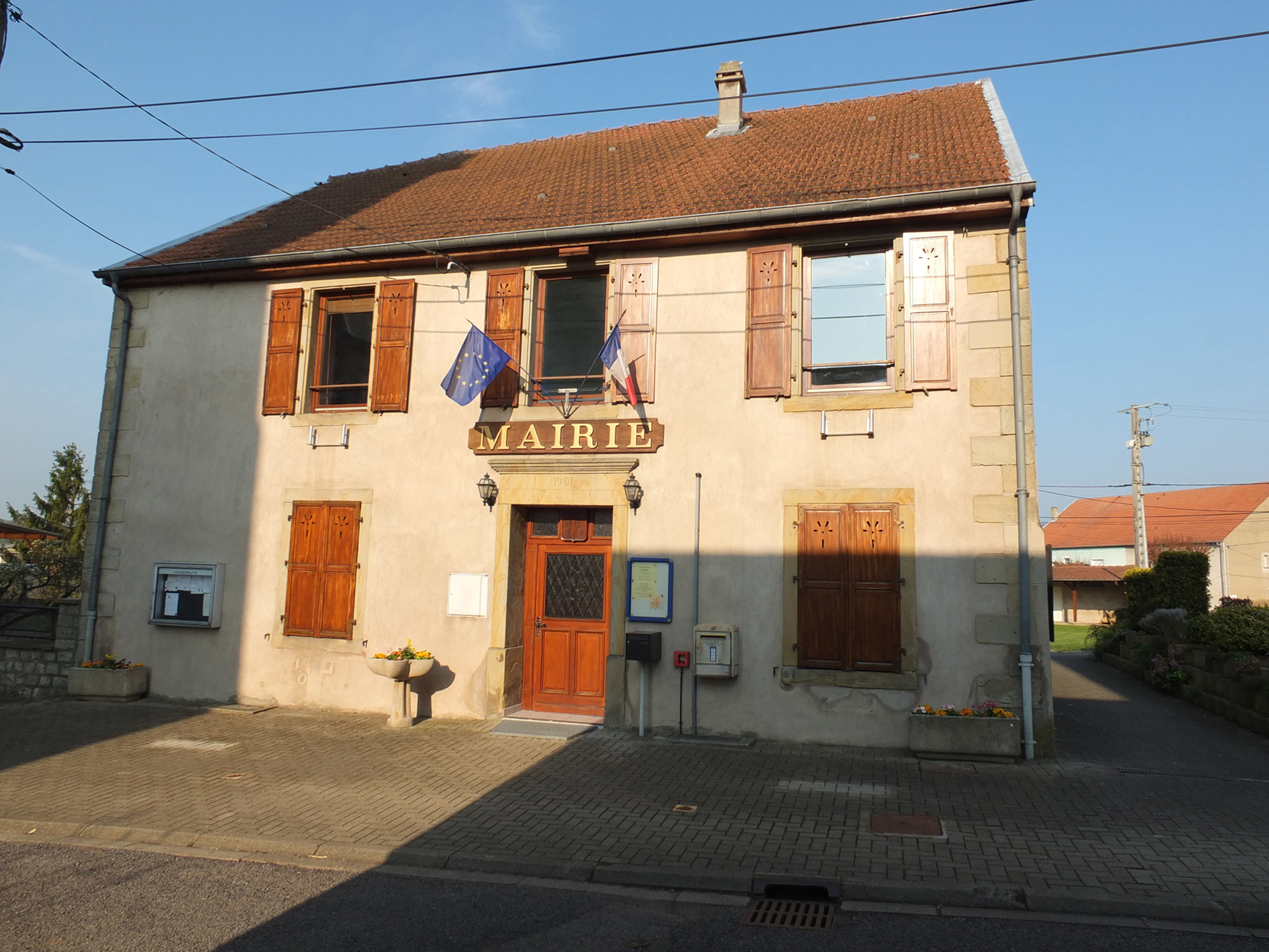 Ce bâtiment était initialement l'ancien presbytère de Guenviller